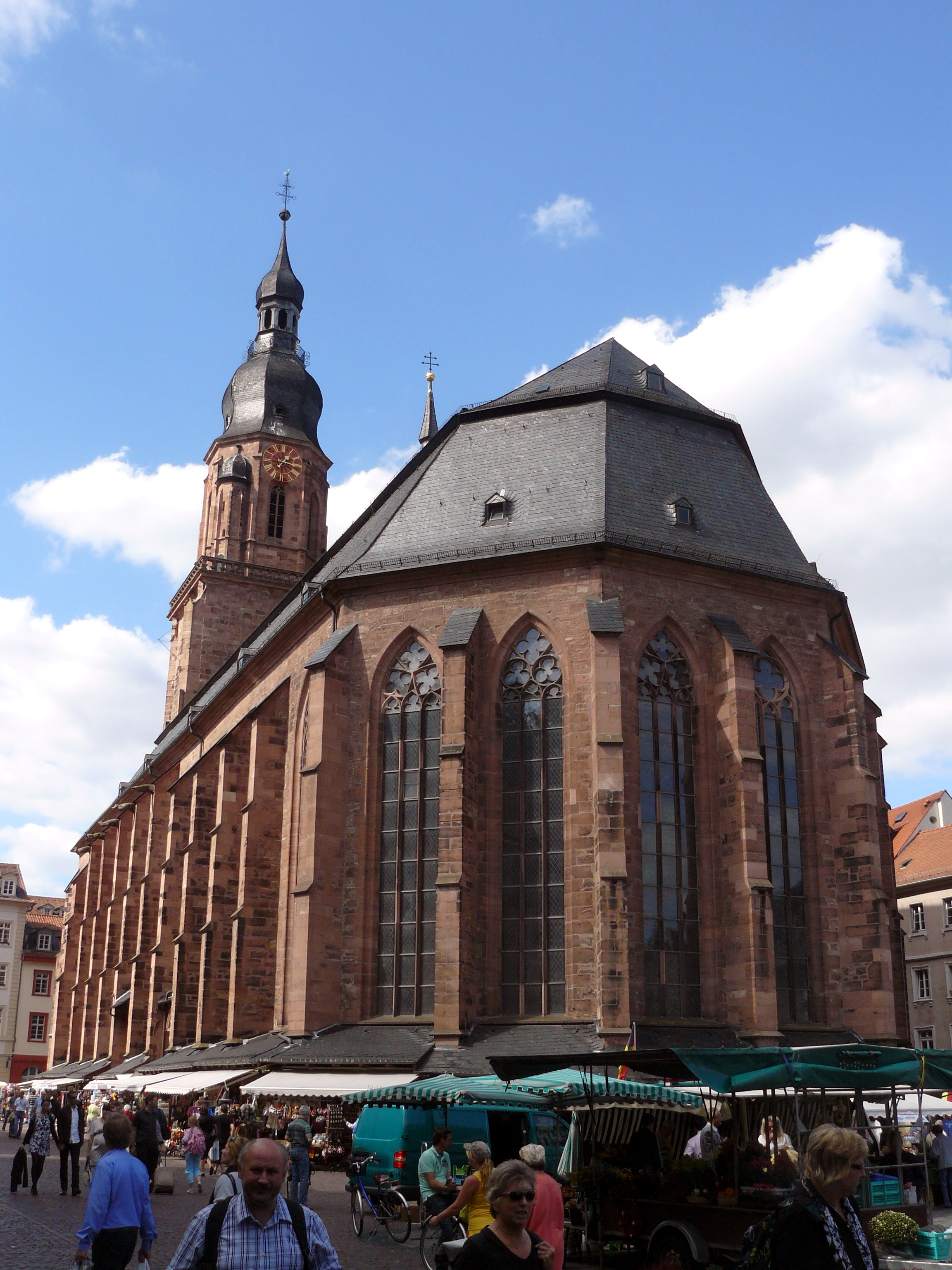 Heidelberger Heiliggeistkirche vom Marktplatz aus